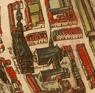 Ausschnitt aus Emden 1575 (Braun Hogenberg, Band II, 1. Auflage)